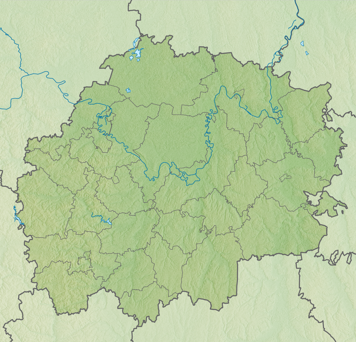 Физическая карта Рязанской области Проекция — равноугольная. Стандартная параллель — 54°30′00″с.ш. Параметры шаблона (координаты краёв): |top = 55.6 |bottom = 53.2 |left = 38.5 |right = 42.8